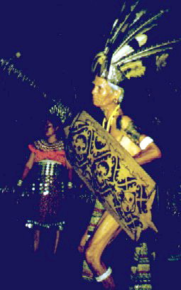 ВождьВождь с острова Борнео